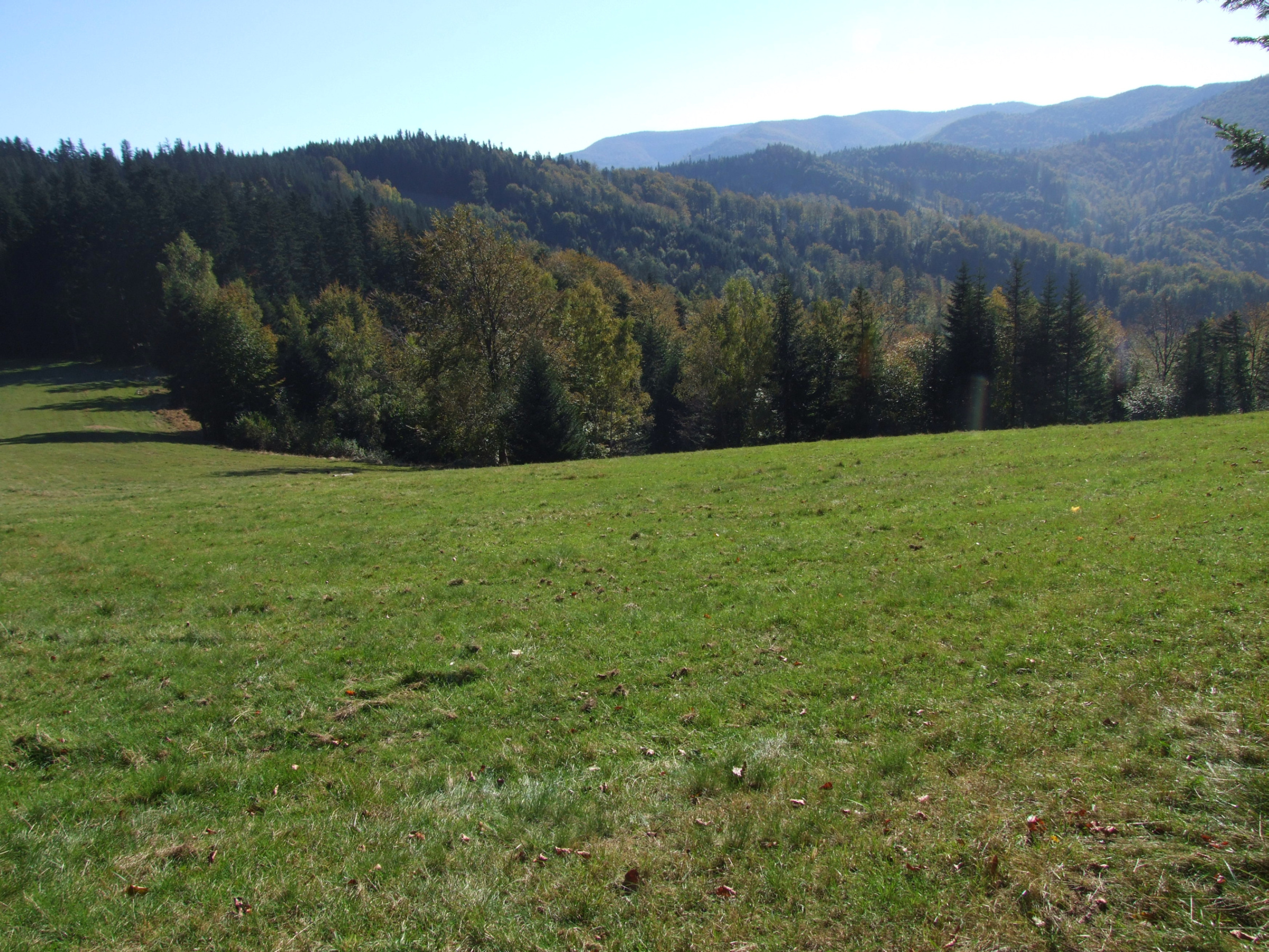 Widok z polany osiedle Malnik) przy zielonym szlaku turystycznym Nowy Sącz -Zeleźnikowa - Makowica na grzbiet Wilcze Doły - Ostra i dolinę Życzanowskiego Potoku